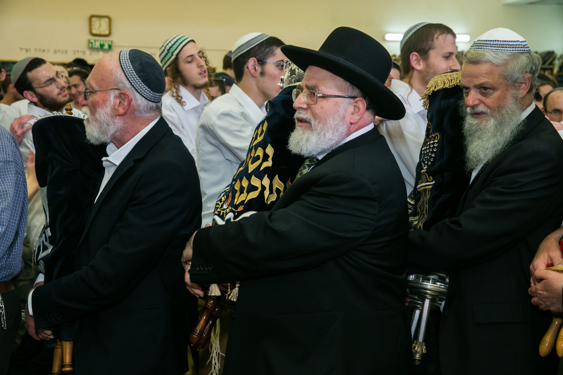 הרב איתמר אורבך (מימין) בהכנסת ספר תורה. לפניו: הרב שלמה שפירא והרב מרדכי גרינברג.